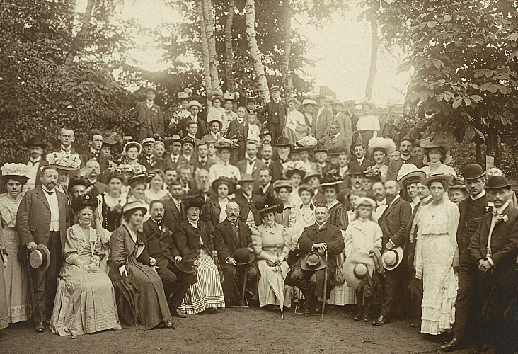 UK 1908 en Dresdeno. Vizito en la esperantista vilaĝo Weisser Hirsch. Klara kaj Ludwik Zamenhof, Marie Hankel, Anna Tuschinski, Théophile Cart, Carlo Bourlet, Henri Dor, Herbert F. Höveler, Karl von Frenckell, Albert Schramm, Gabriel Chavet, Eduard Mybs, Leopold Elb.